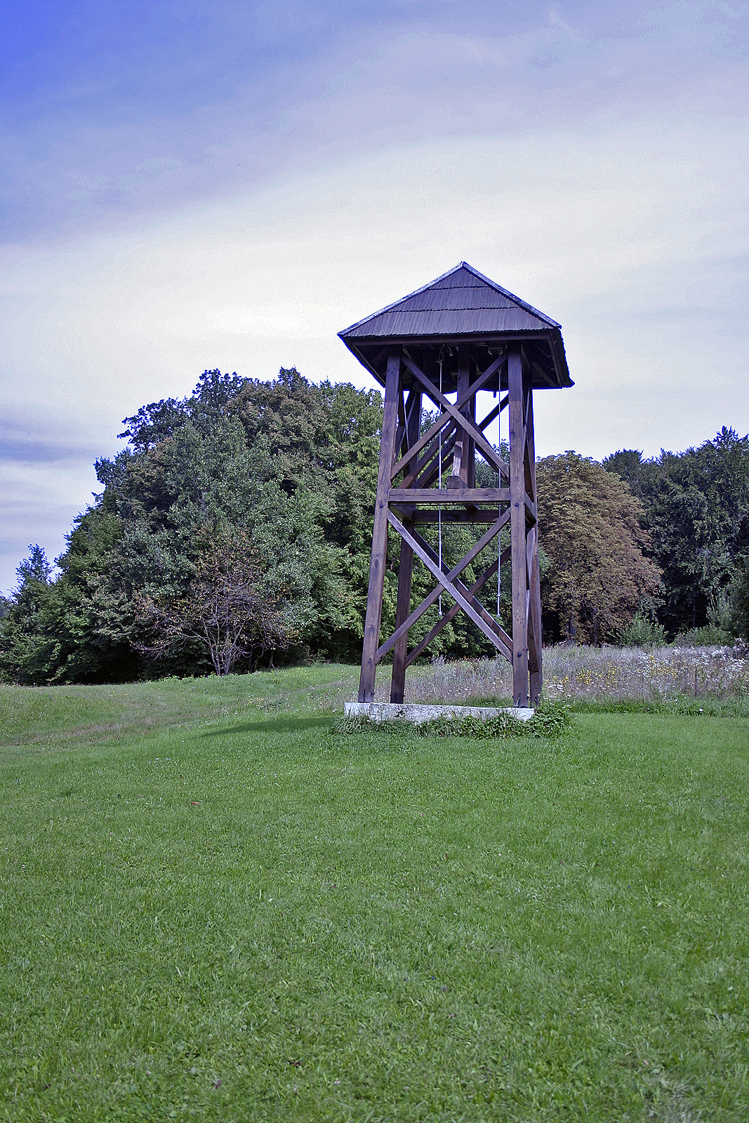 l